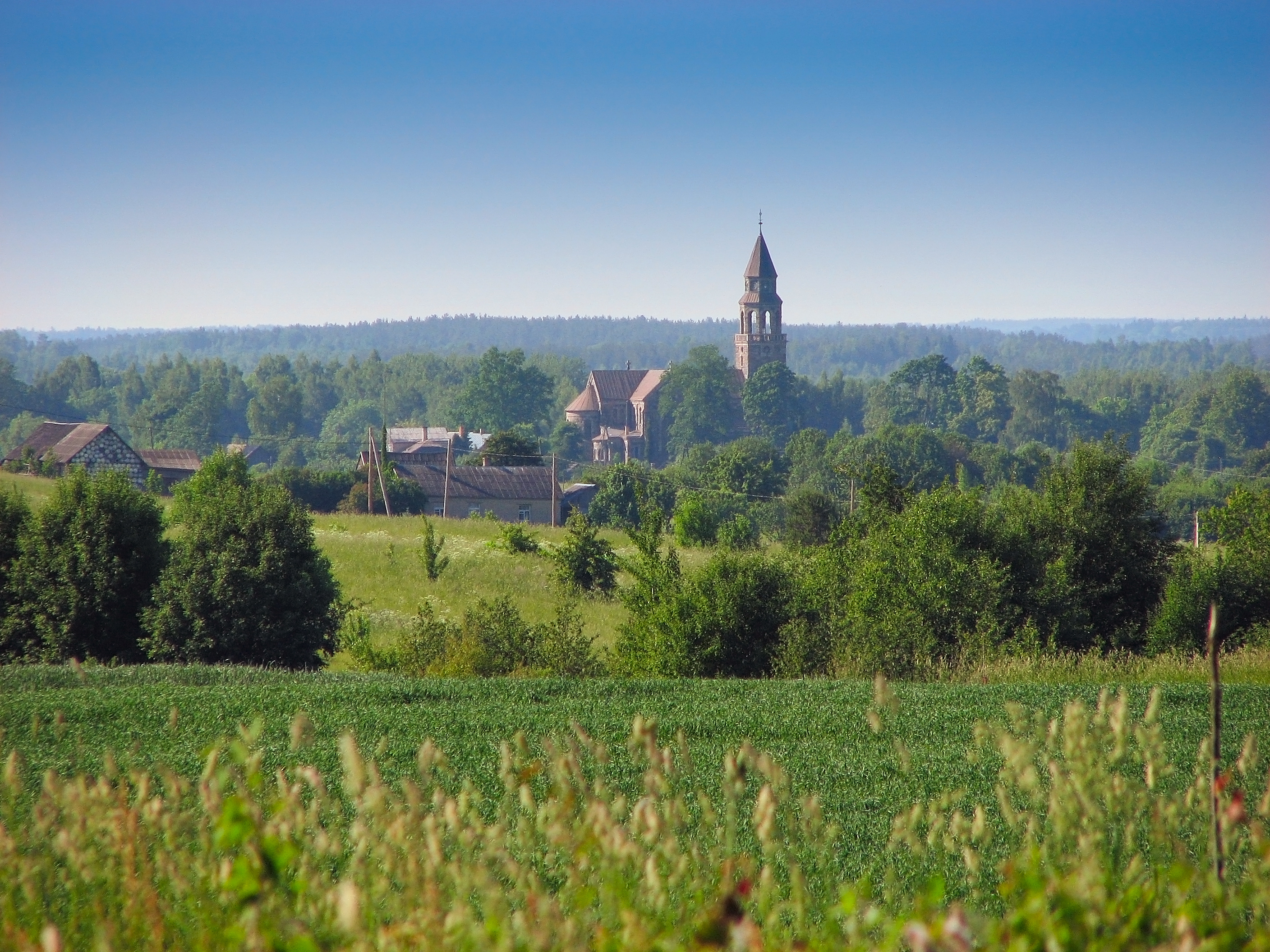 Višķi Parish, Latvia